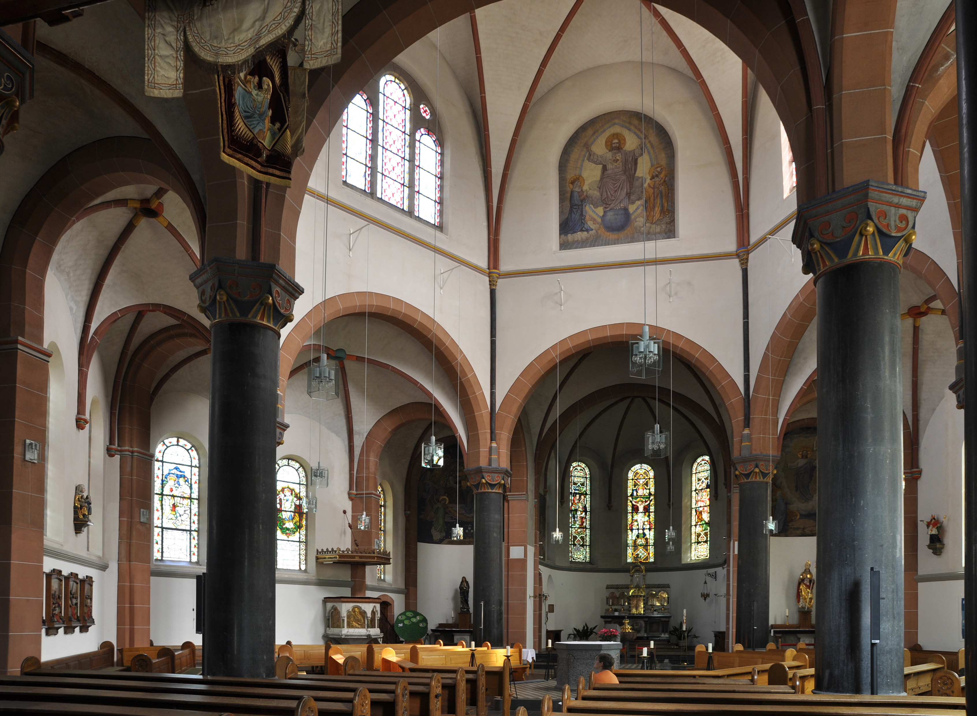 Blick nach Nordwesten